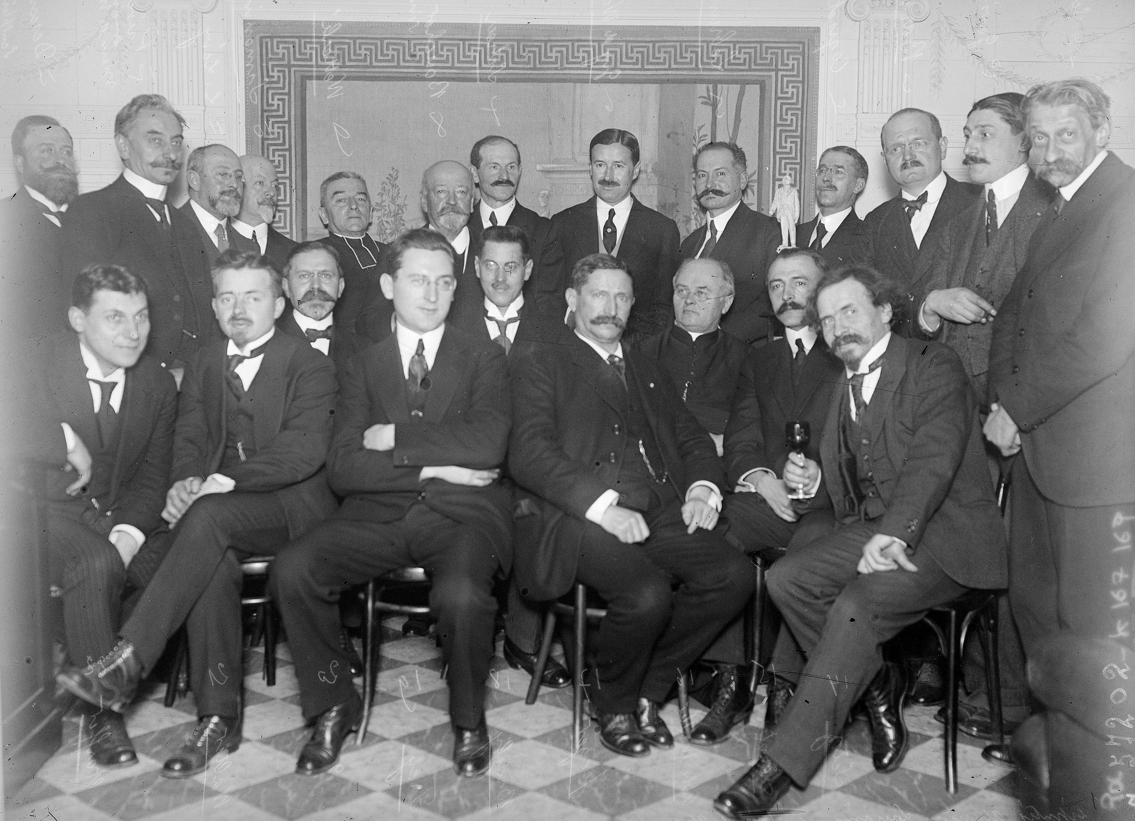 . Schwob, Geville, Baradé, Caquot, Lebrun, Guy de Wendel, Scheer, Boucher sénateur, Wetterlé, Simonin, L. Lévy, Prével ancien maire de Metz, Descamps sculpteur, Seltz, Sérot, abbé Muller, Jaeger, Brogly, Frey, Walter, Altorffer, députés alsaciens lorrains au journal Alsace Lorraine : [photographie de presse] / [Agence Rol]